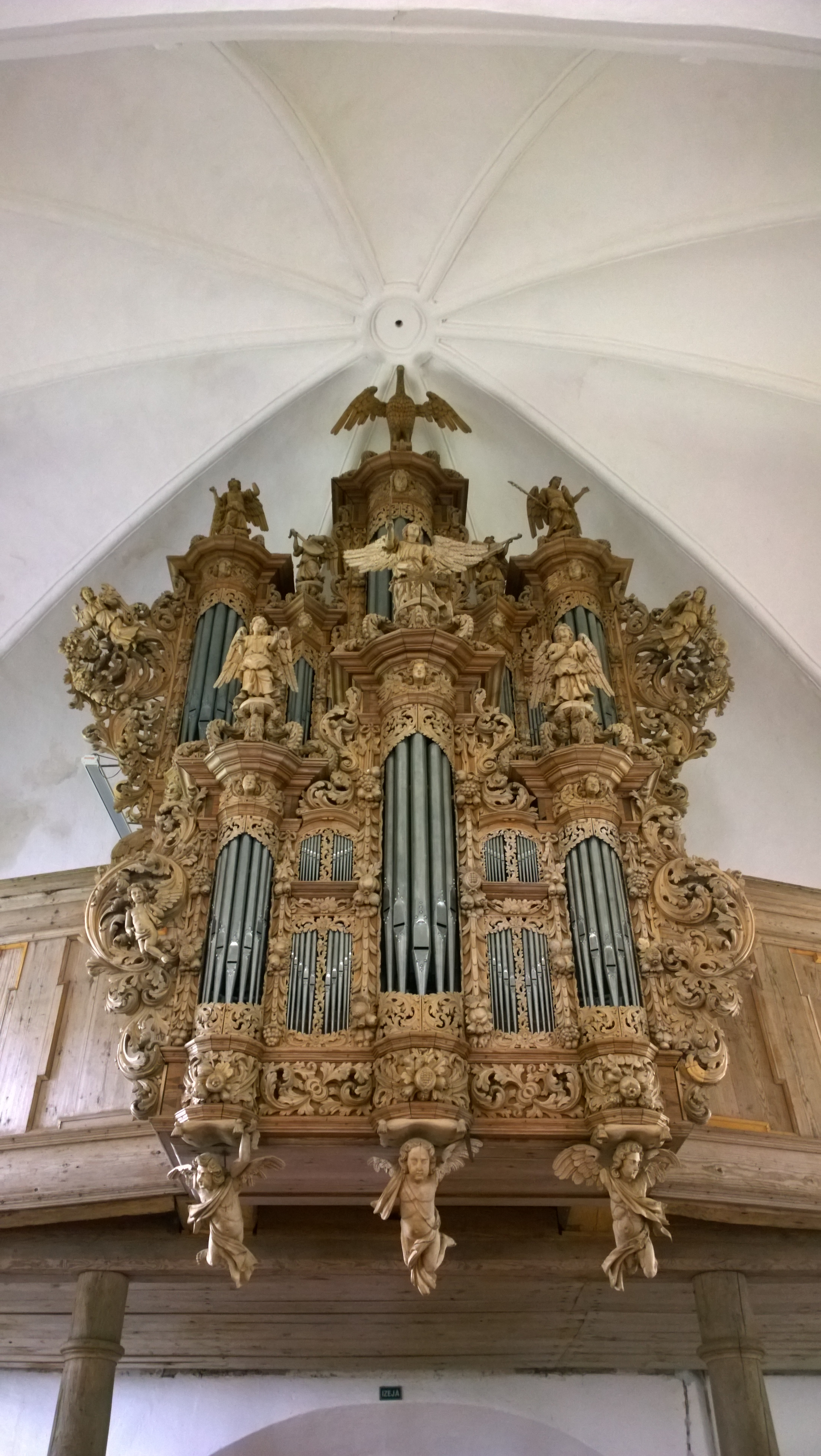 Ērģeles un ērģeļu prospekts, Ugāle